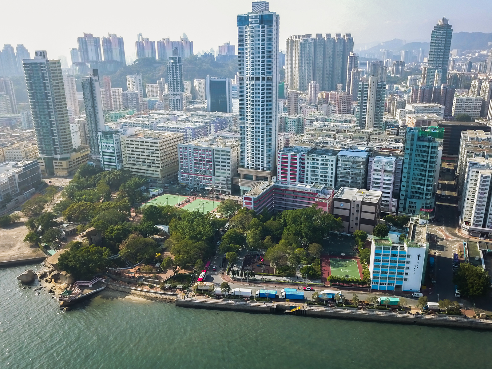 Bayview, Hong Kong